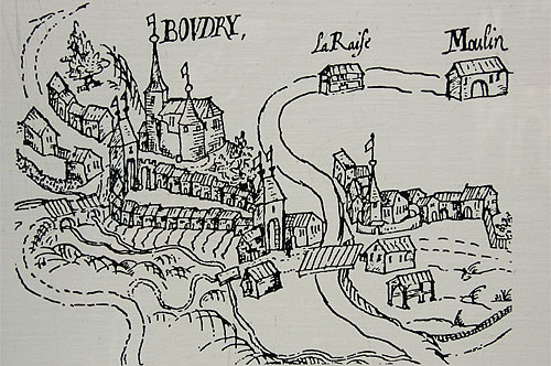 Boudry: Plan vieux